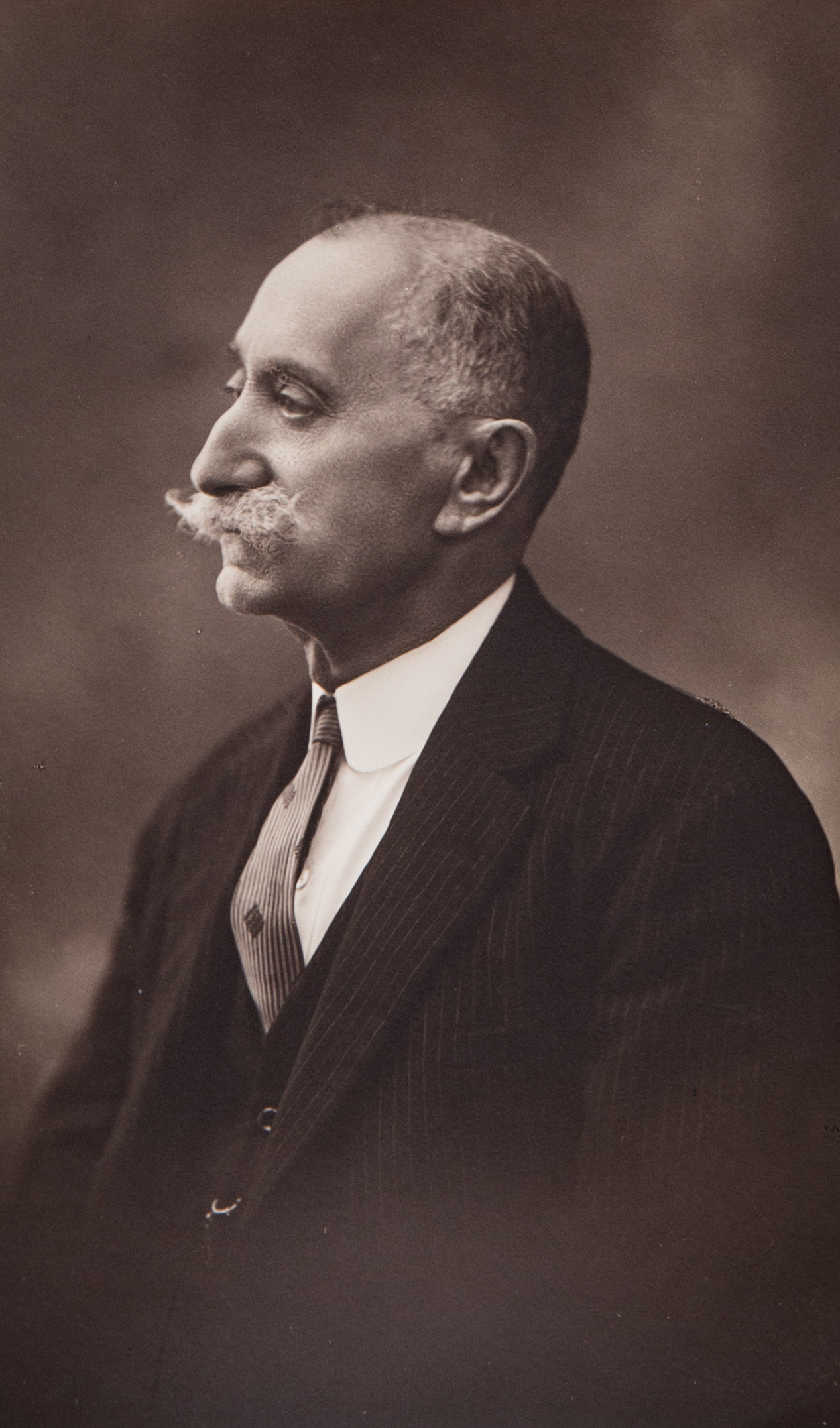 Modesto Giappichelli - Fondatore della casa editrice G. Giappichelli Editore in una foto degli anni '30 dall'archivio storico della famiglia Giappichelli